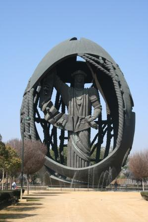 Huevo de Colón en el Parque de San Jerónimo de Sevilla. Obra del escutor georgiano-ruso Zurab Tsereteli.